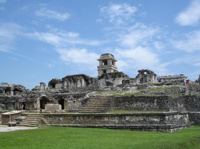 Дворец в Паленке. Фото Ю.Полюховича